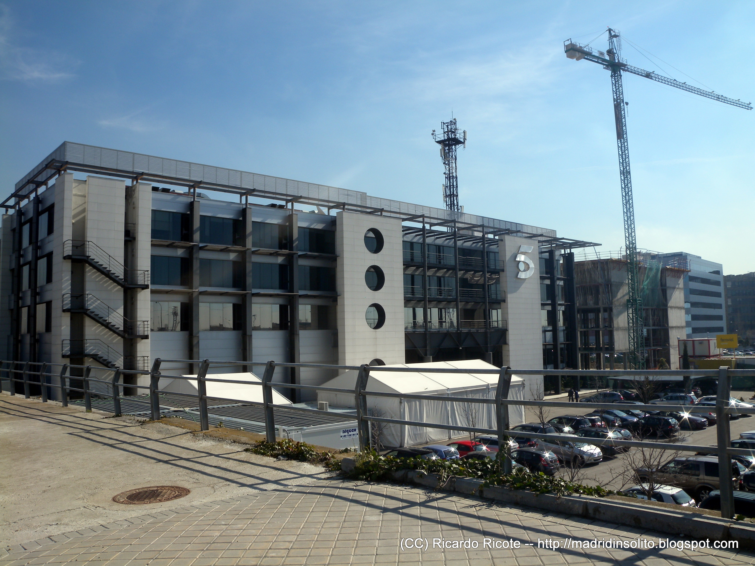 Vista desde las afueras del edificio de Telecinco y Cuatro en Fuencarral, Madrid.